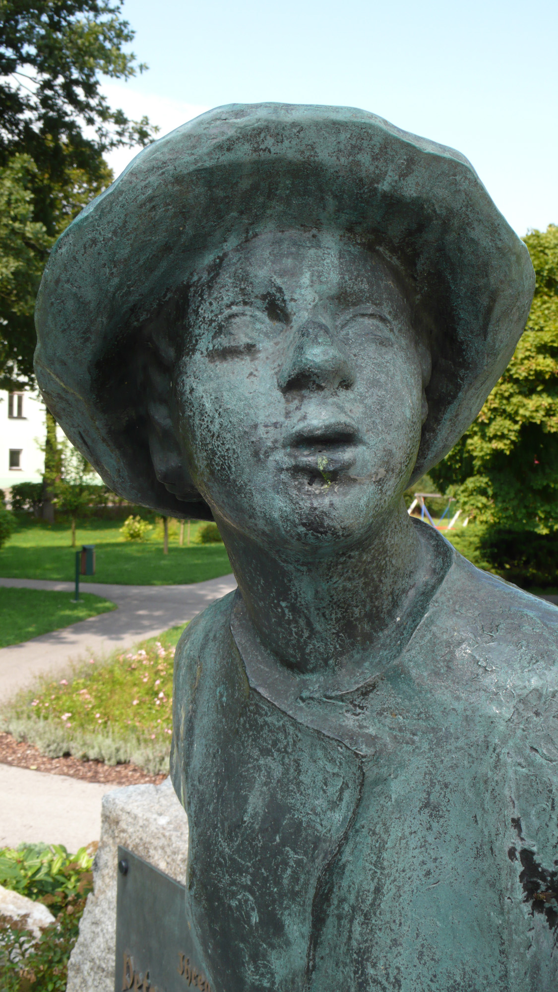 Selbst erstellte Fotografie des öffentlich zugänglichen Denkmals für Peter Rosegger in Krieglach.